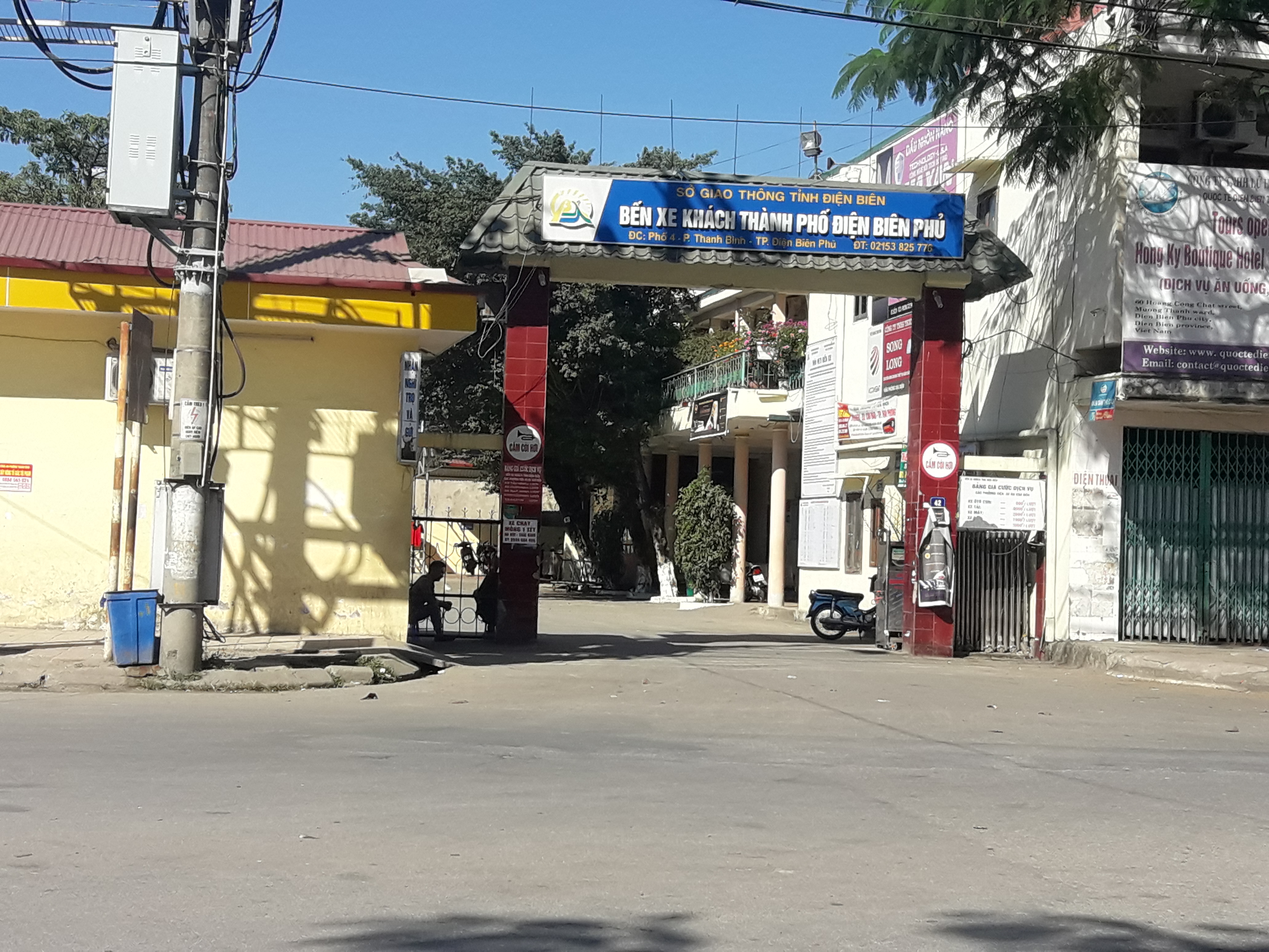 Bến xe